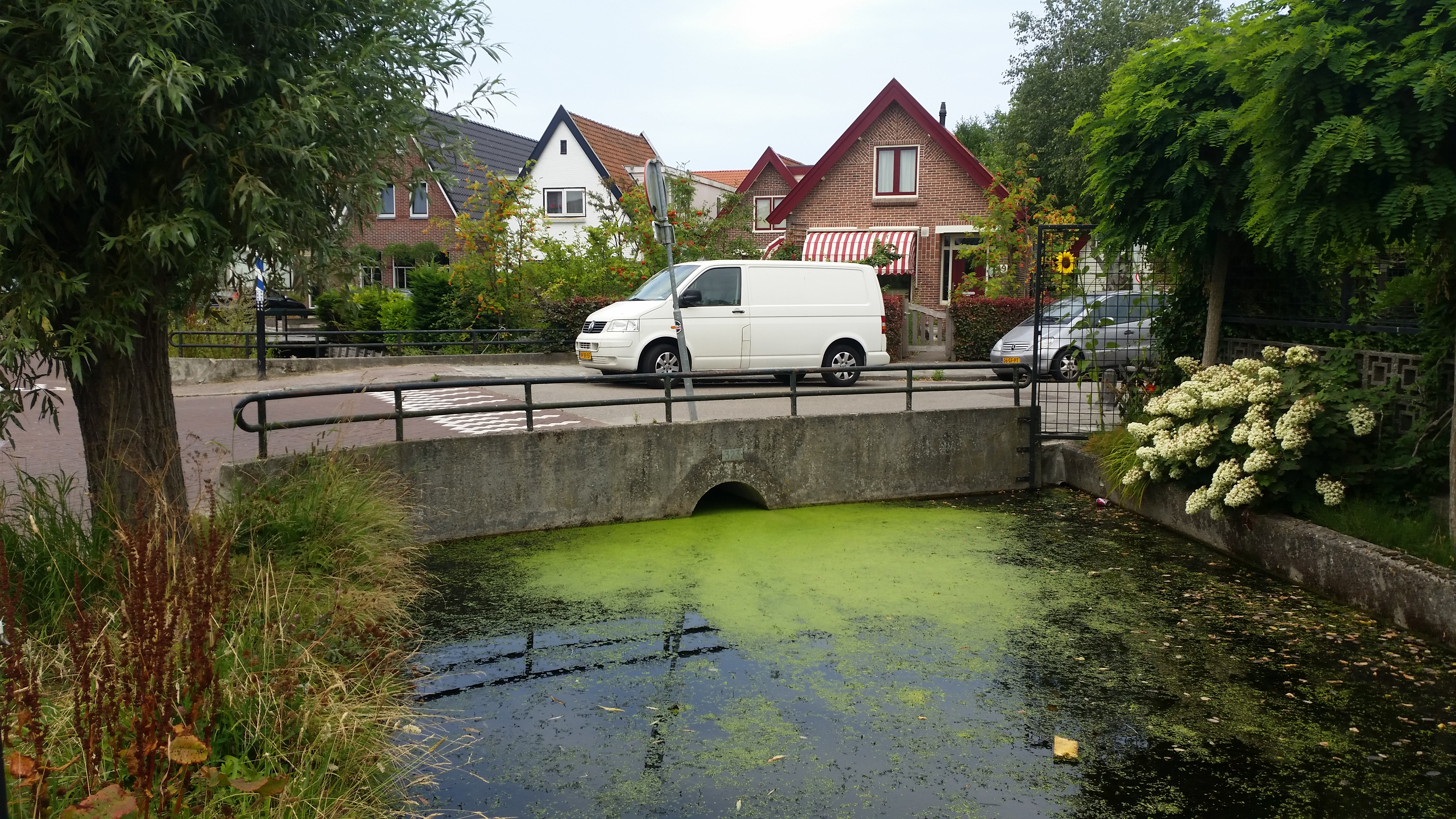 Brug 323 (in Amsterdam), overspanning